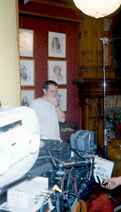 en pleins tournage de "Le sens des affaires"